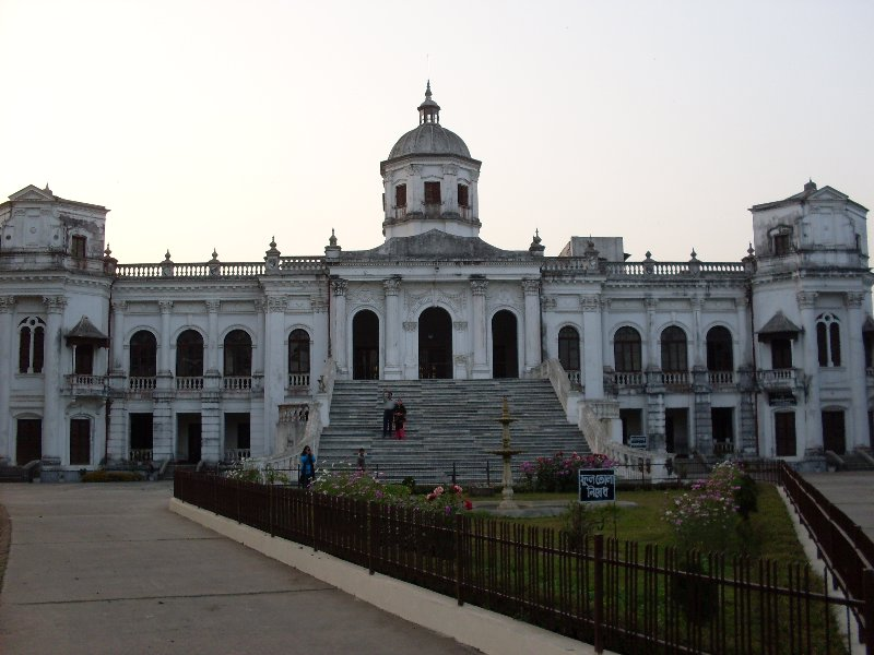 সামনে থেকে তাজহাট রাজবাড়ী